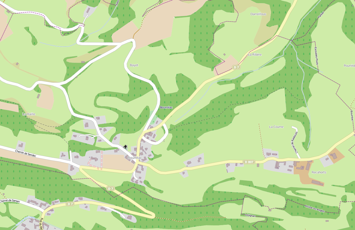 Plan de Bourréac (Hautes Pyrénées) au début de 2013, tiré d'Openstreetmap